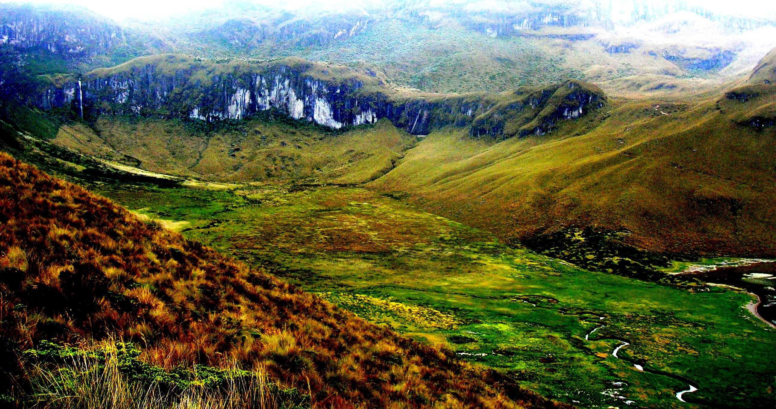 Cascada que alimenta los riachuelos que alimentan a su vez la Laguna del Otún. El agua de la cascada proviene del deshielo y la captación de humedad del Nevado Santa Isabel (Poleka kasue)